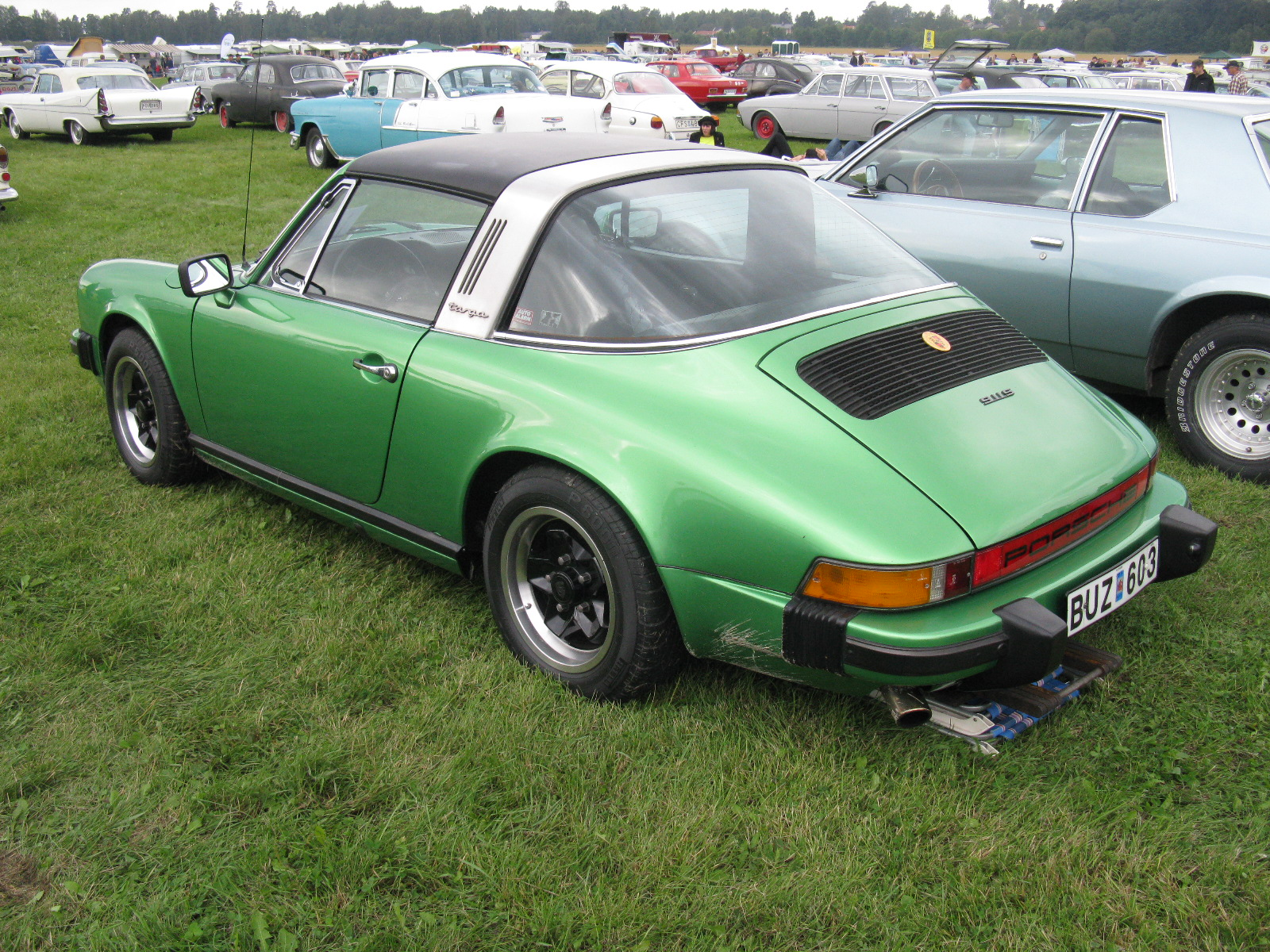 Porsche 911 Targa